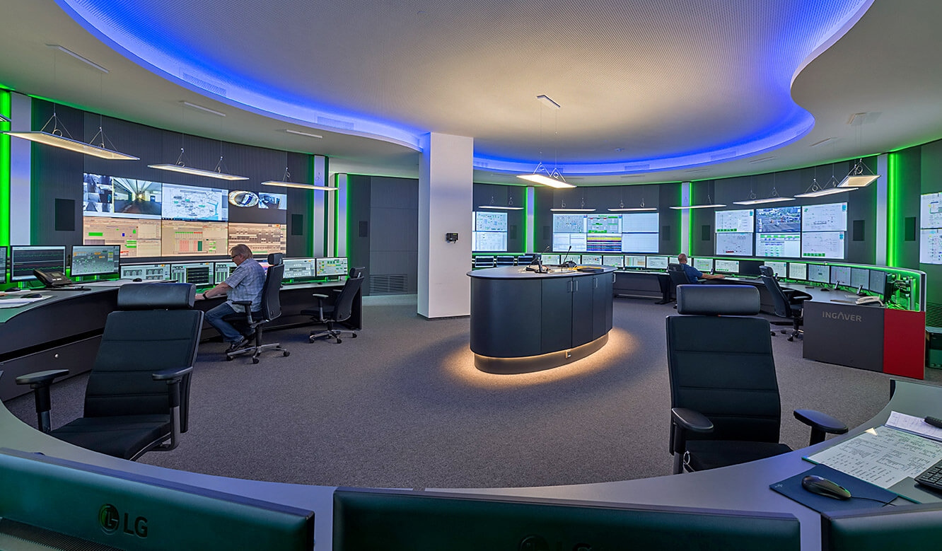 Neue Leitwarte der INGAVER Bremen (2019)